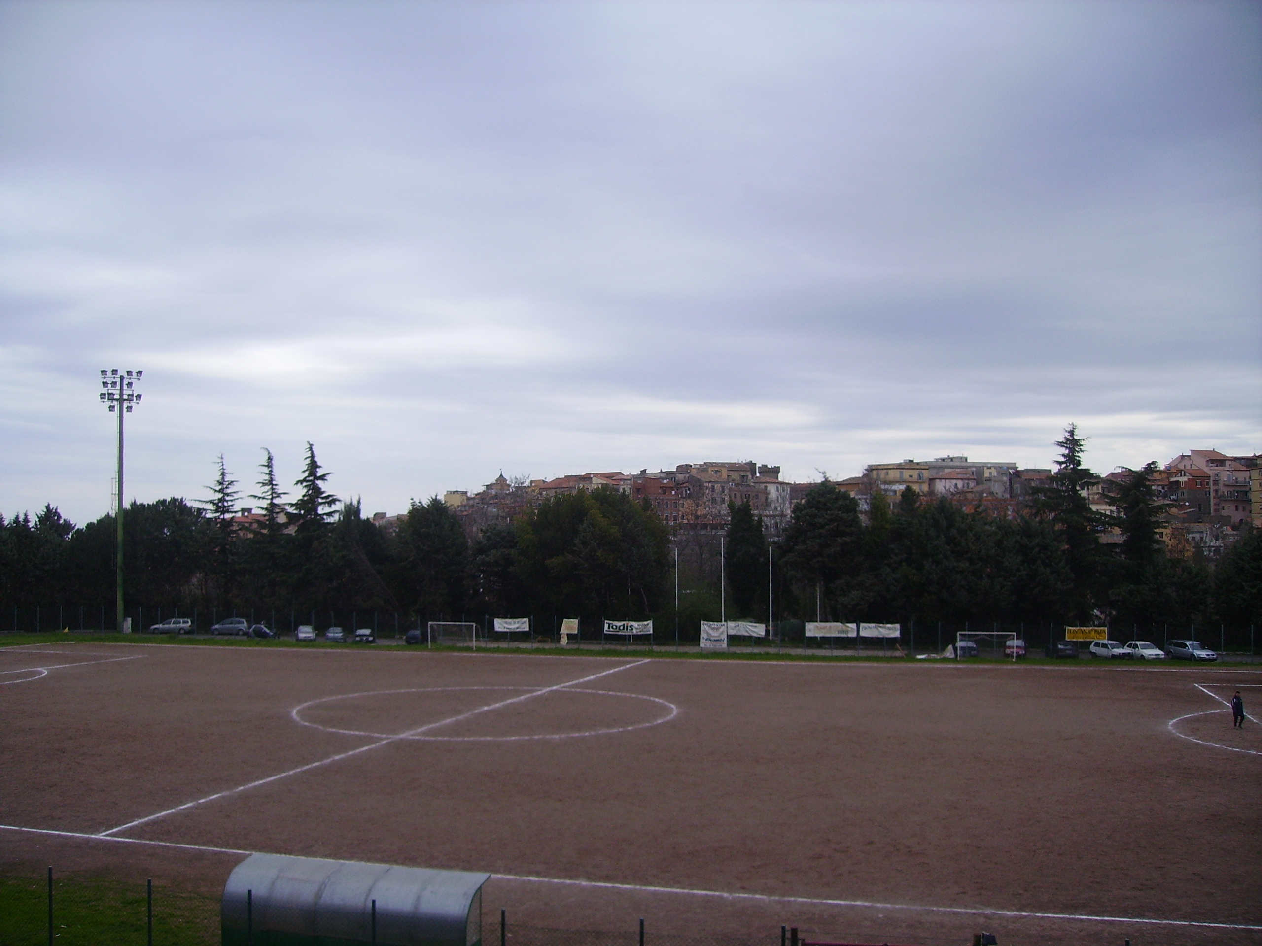 Stadio Comunale di Rapolla